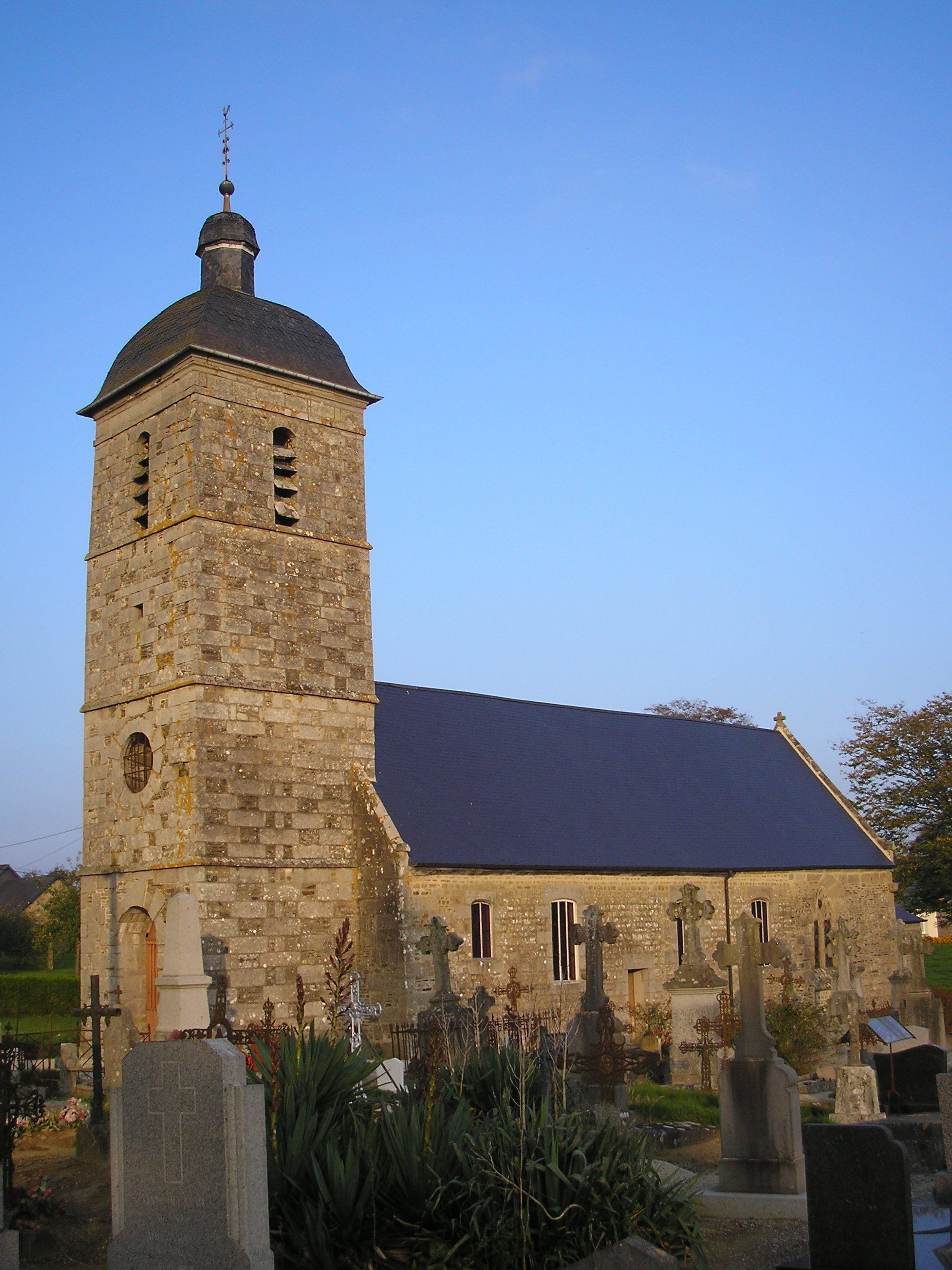 Le Mesnil-Caussois (Normandie, France). L'église Saint-Pierre.